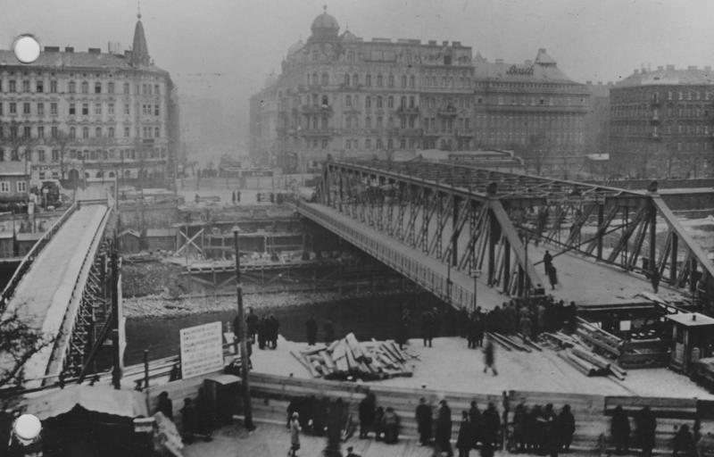 Wien. Verschiebung einer Donaubrücke in Wien um zwanzig Meter. Mit einer nur eintägigen Verkehrsunterbrechung wurde in Wien dieser Tage die über den Donau-Kanal führende Brigittabrücke um 20 Meter verschoben, um den Bau einer neuen Brücke an gleicher Stelle zu ermöglichen. Zu diesem Zwecke wurden die Enden der Brücke auf Rollwagen befestigt, die auf unterlegten Schienen laufend durch Winden gezogen, die 700.000 kg. schwere Brücke an ihren neuen Platz beförderten. Die Brücke während der Verschiebung.